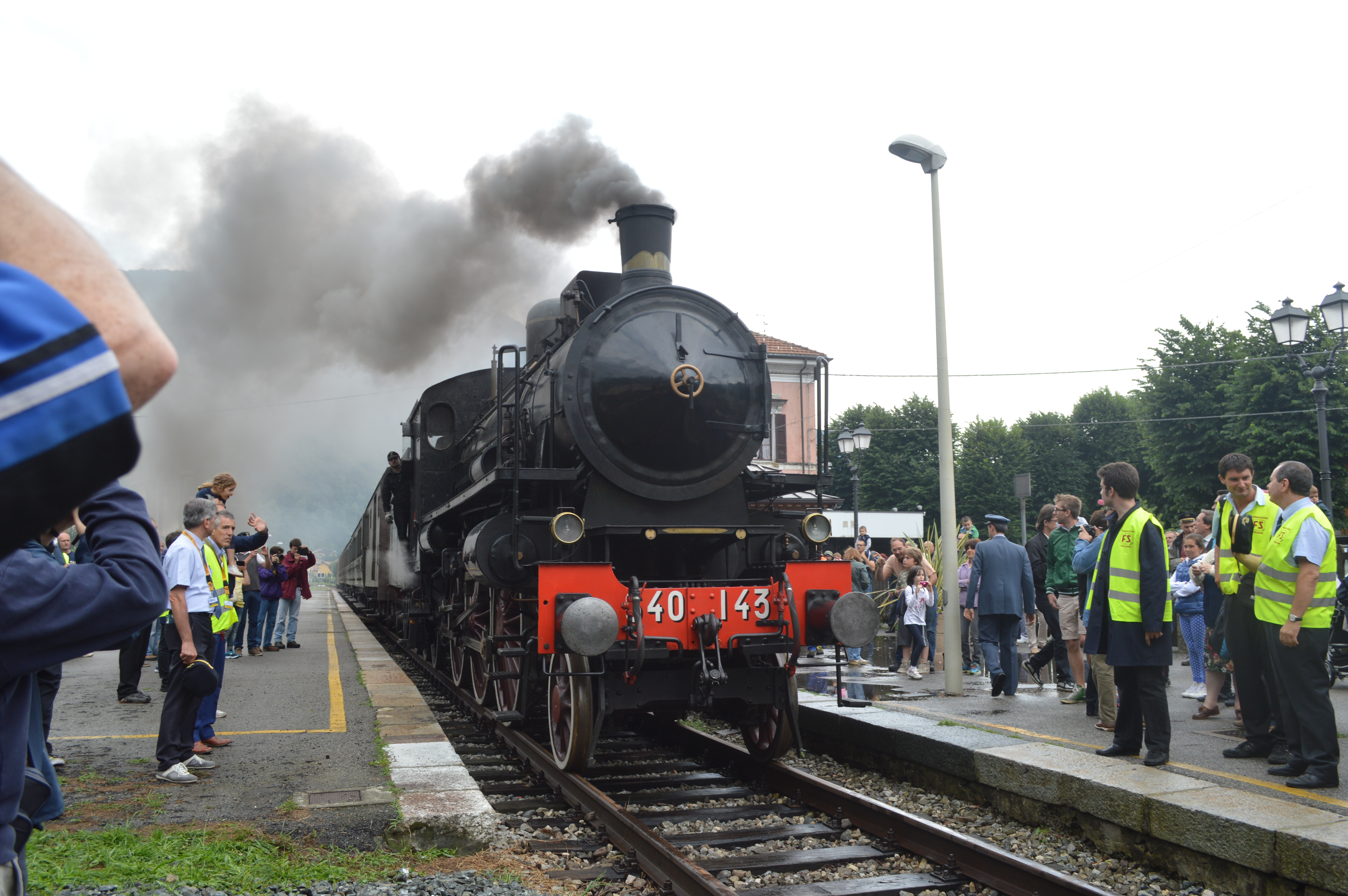 Treno storico composto da carrozze Centoporte, con locomotiva a vapore.